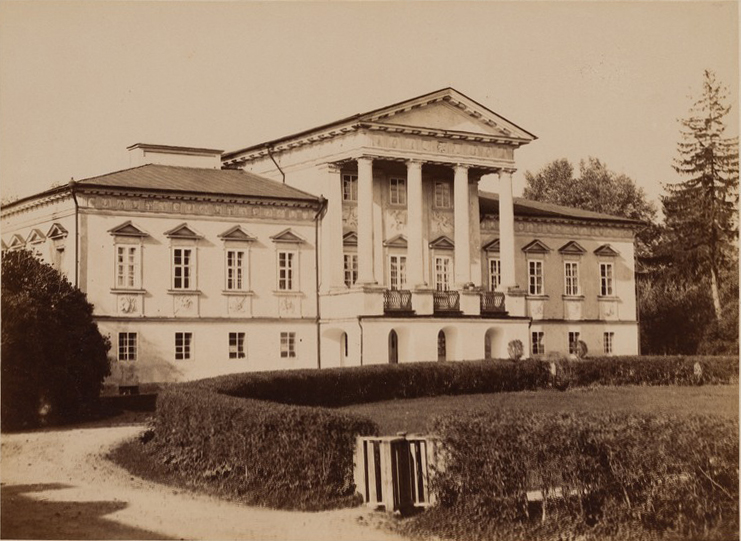 Беларуская (тарашкевіца): Сваятычы (Svajatyčy), сядзіба Чапскіх (Čapski)